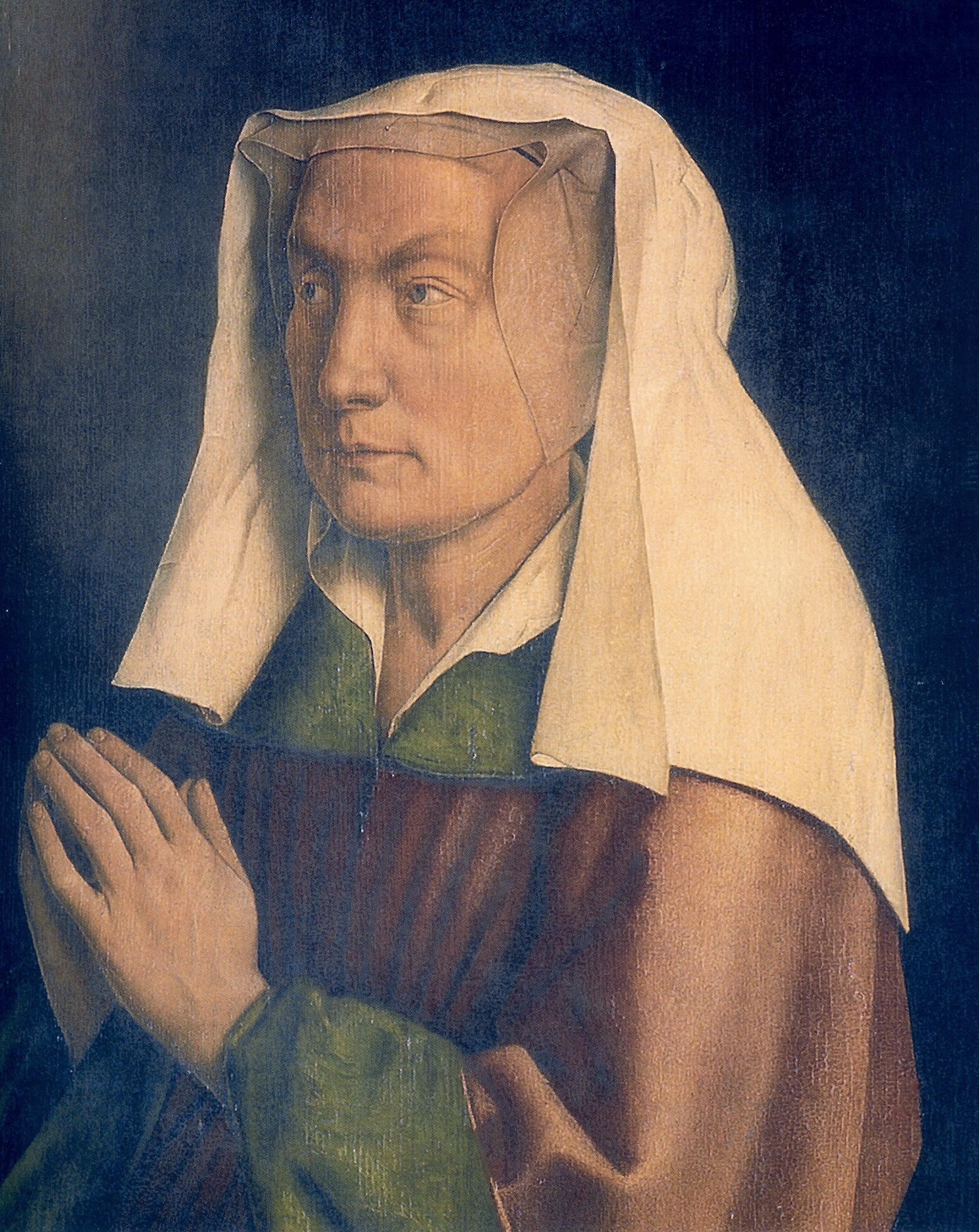 detail: Lysbette Borluut